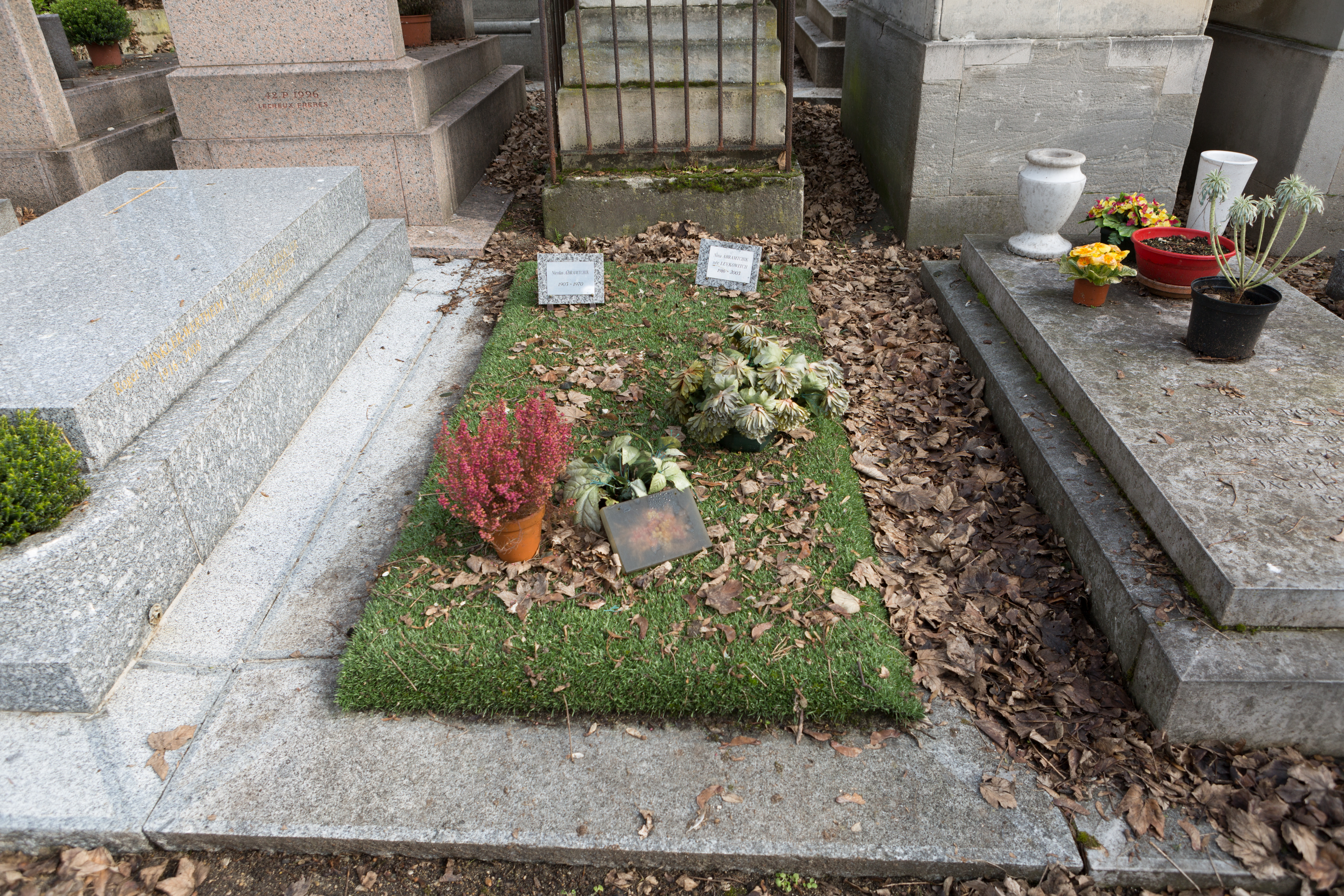 Sépulture de Nicolas Abramtchik (1903-1970), homme politique et journaliste biélorusse. Il fut le président de la République populaire biélorusse (le régime biélorusse en exil depuis 1919) de 1944 à la fin de sa vie.